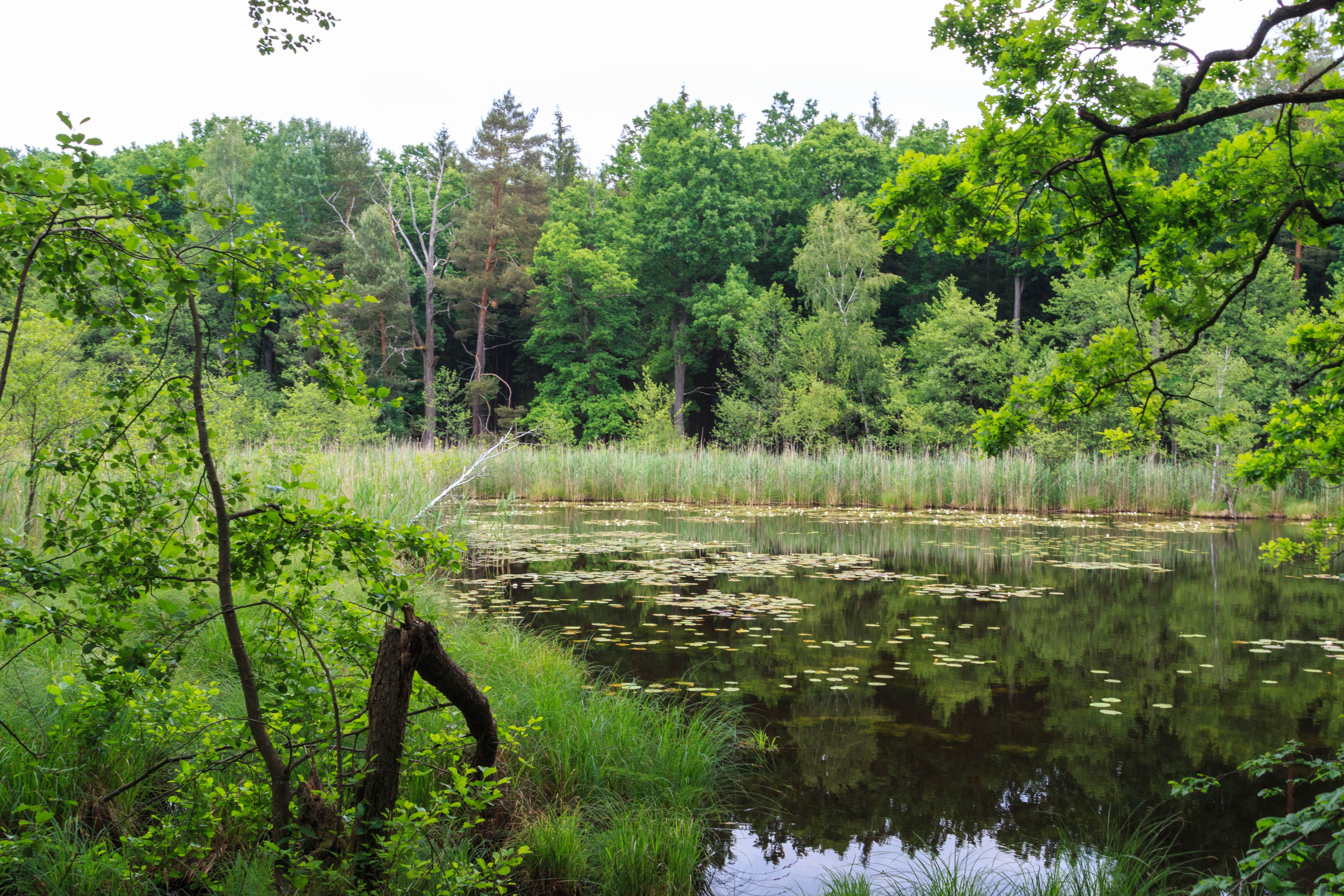 přírodní rezervace U Houkvice Project: Chráněná území.